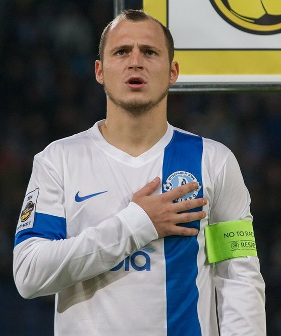 Роман Зозуля - футболіст Дніпра (Дніпропетровськ)